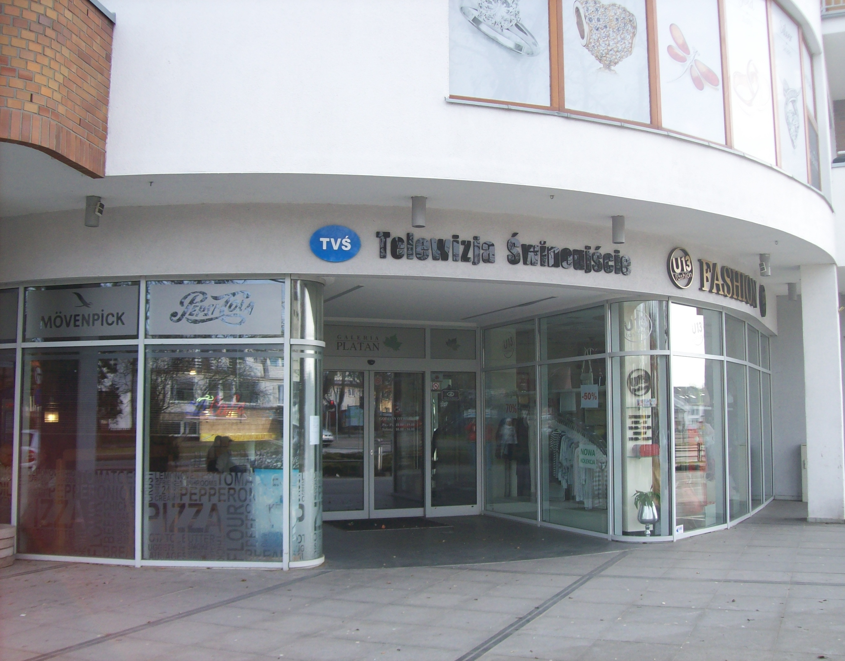 Telewizja Świnoujście